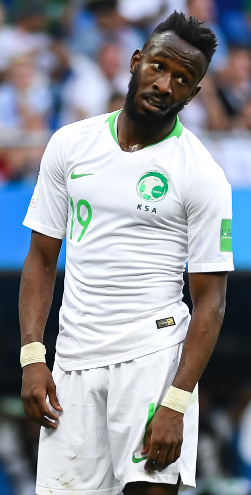 Гол Суареса на «Ростов Арене» вывел Уругвай в плей-офф чемпионата мира